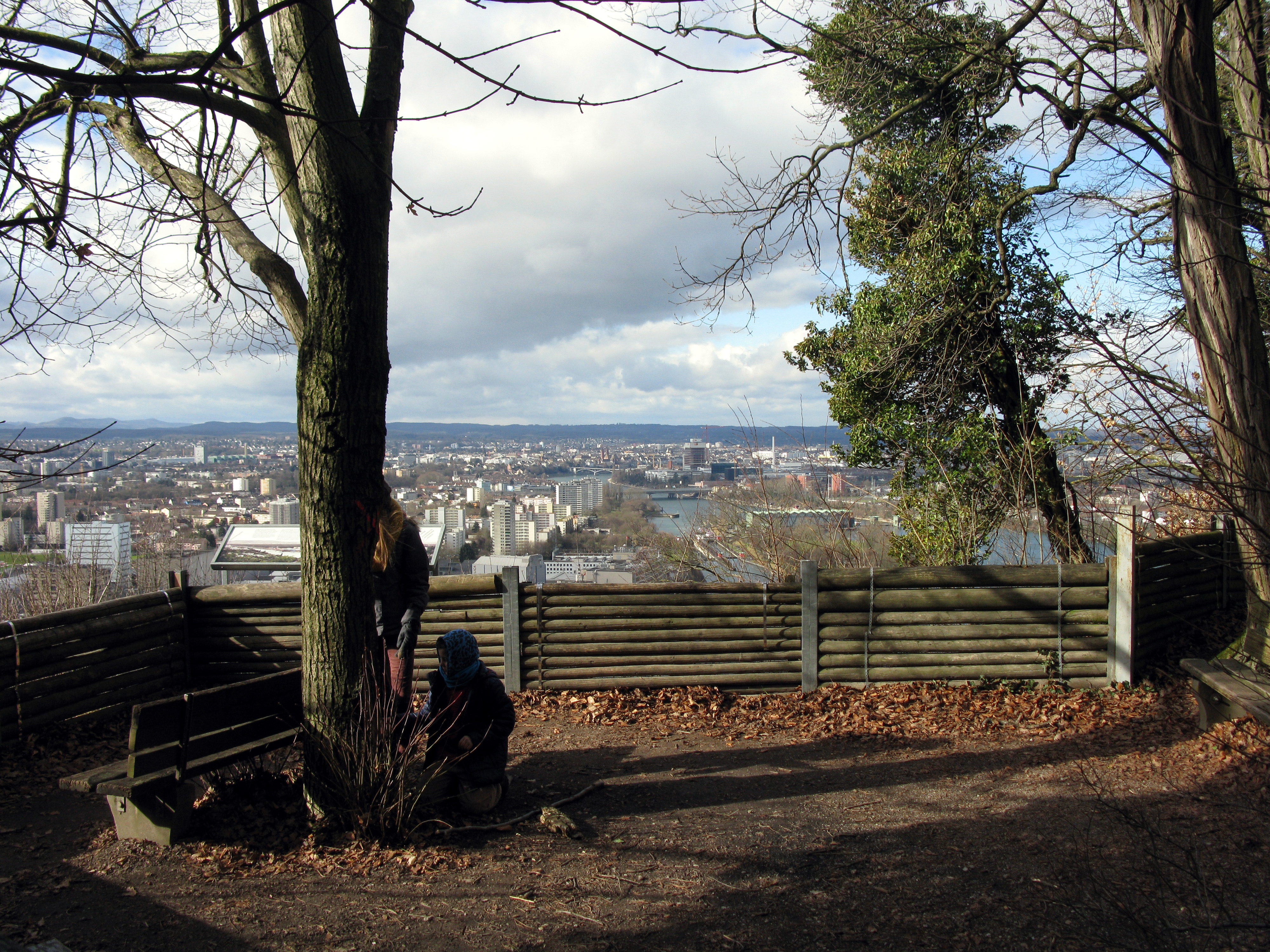 Blick nach Basel vom Aussichtspunkt auf dem Grenzacher Hornfelsen